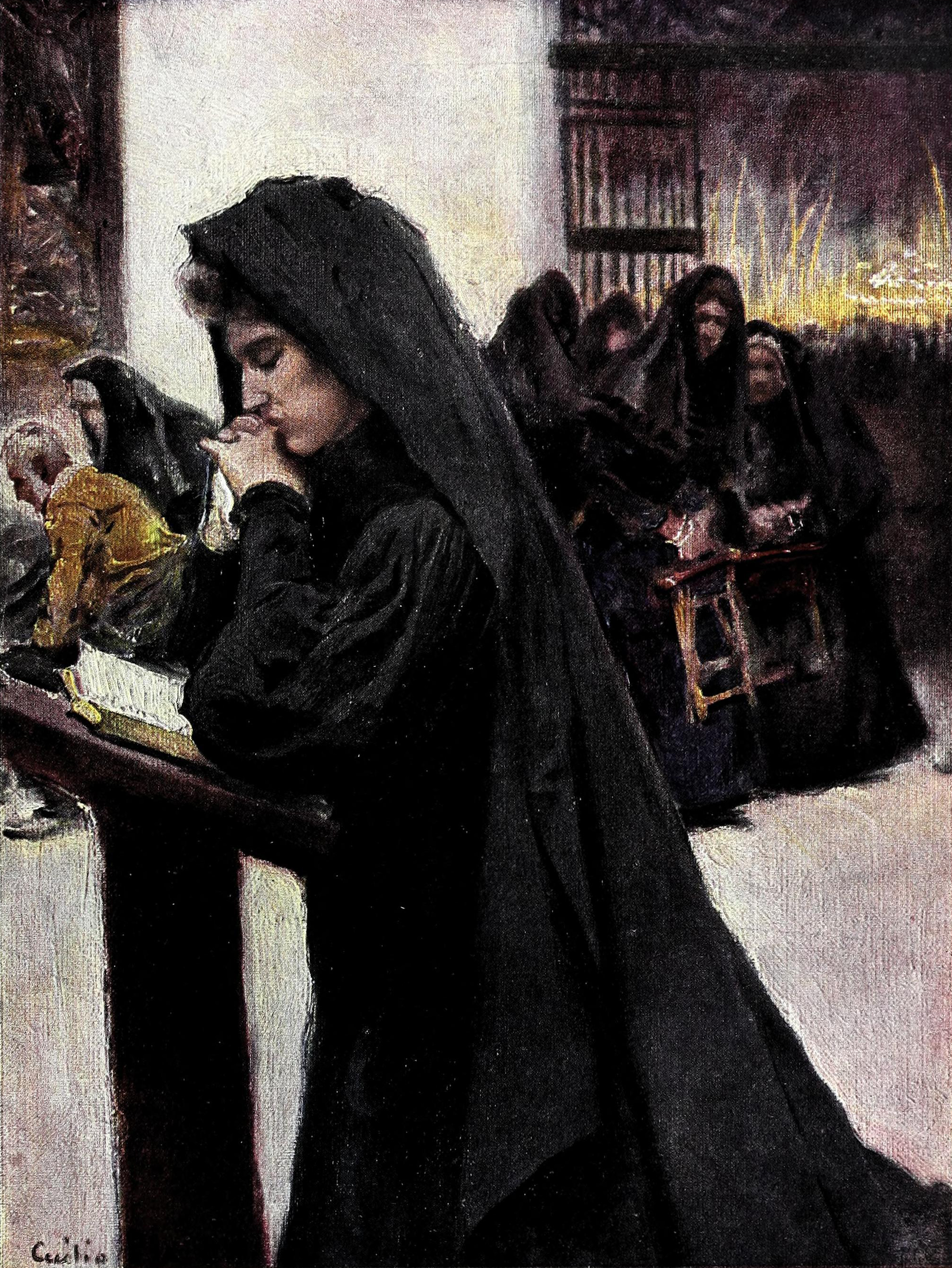 Gloria.